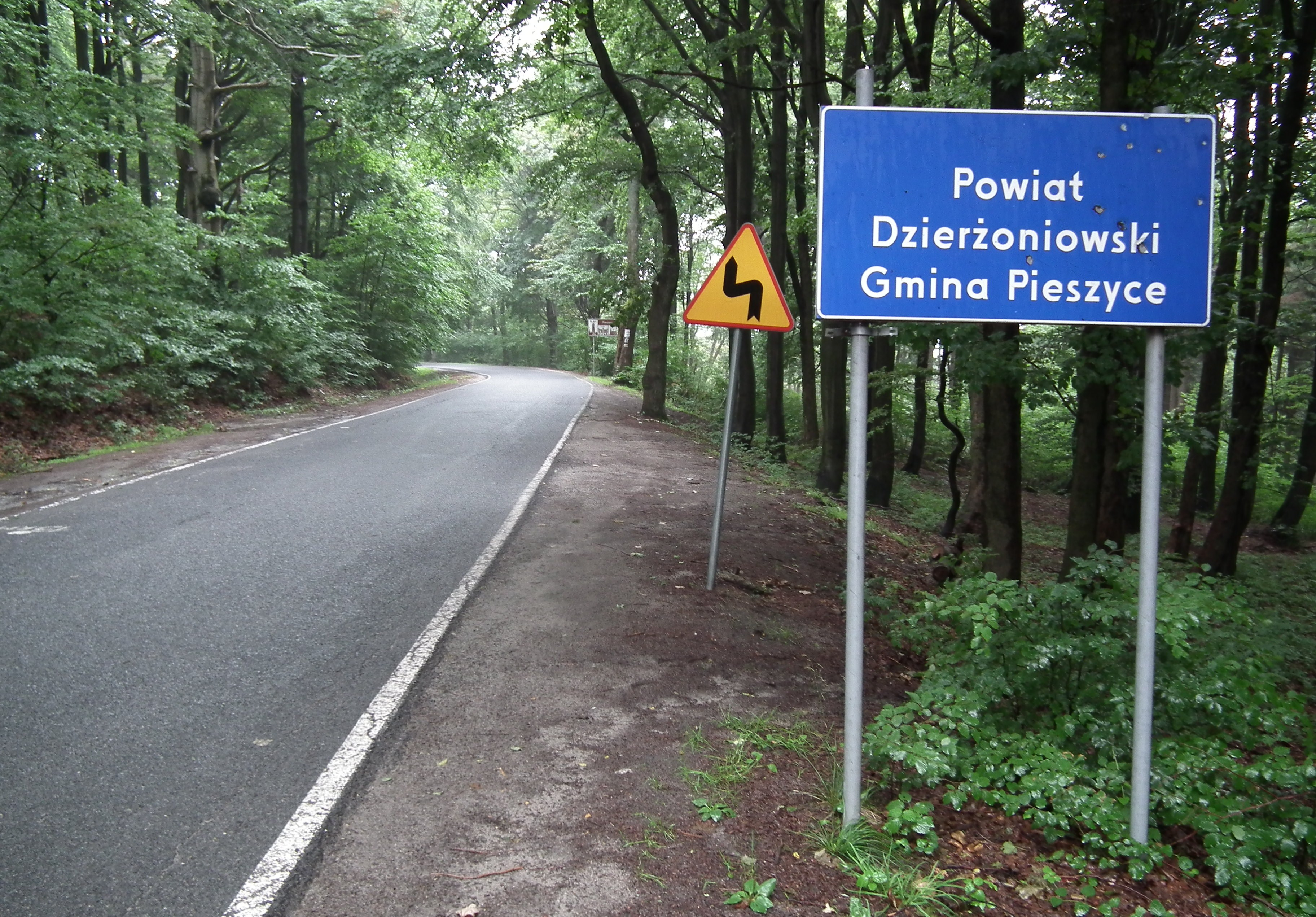 Przeł. Jugowska.